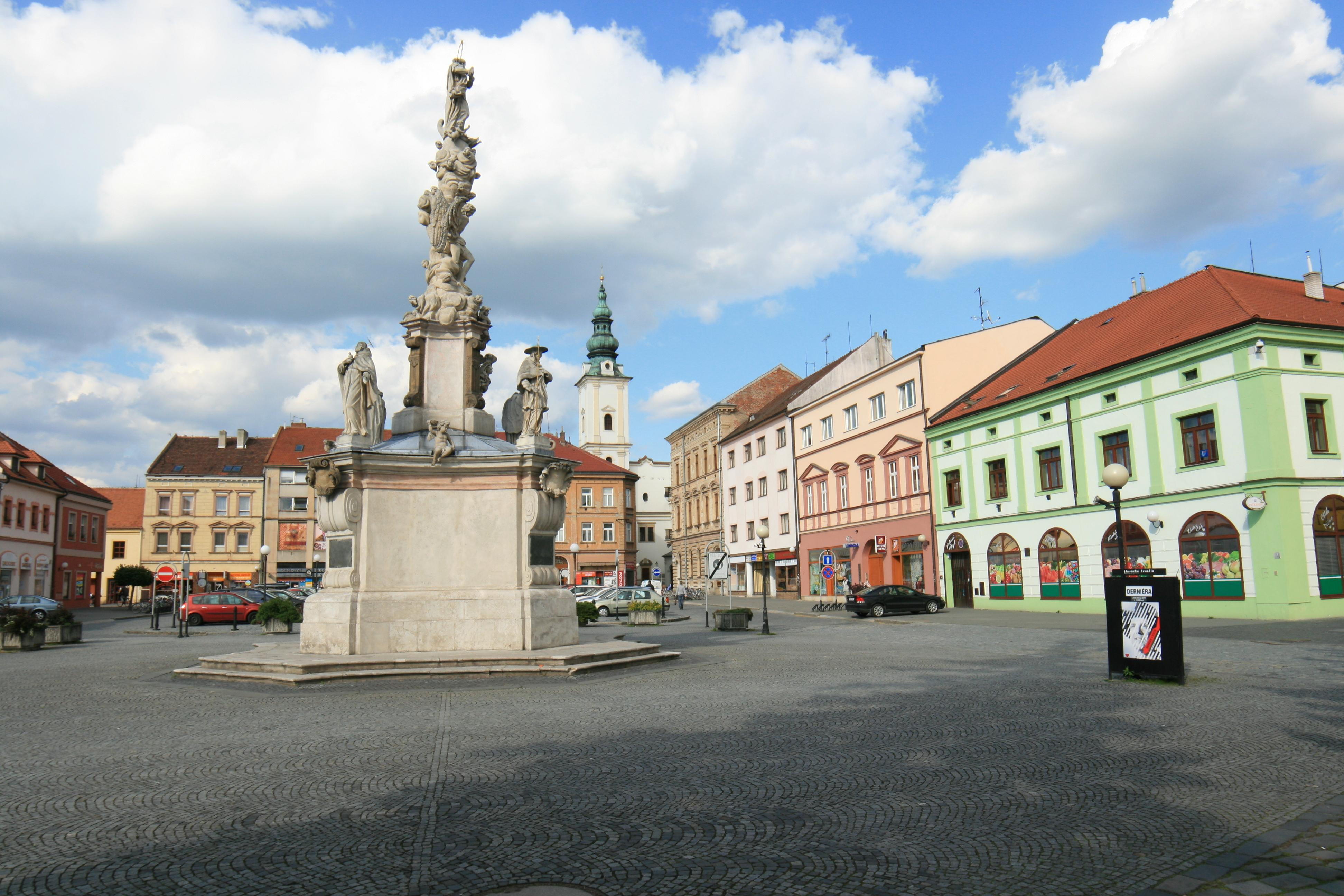 Uherske Hradiste, Czech Republic